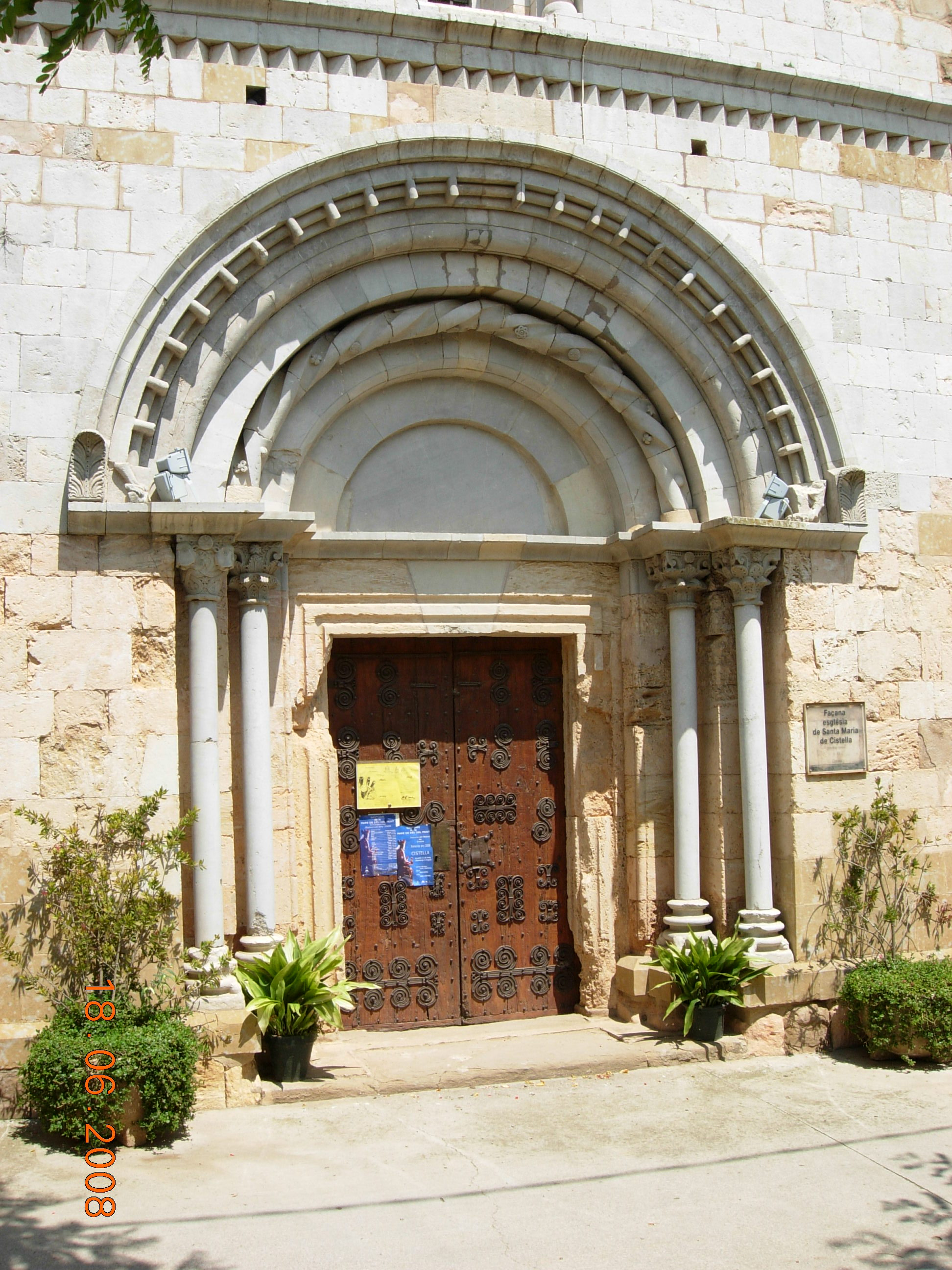 portail de l'église